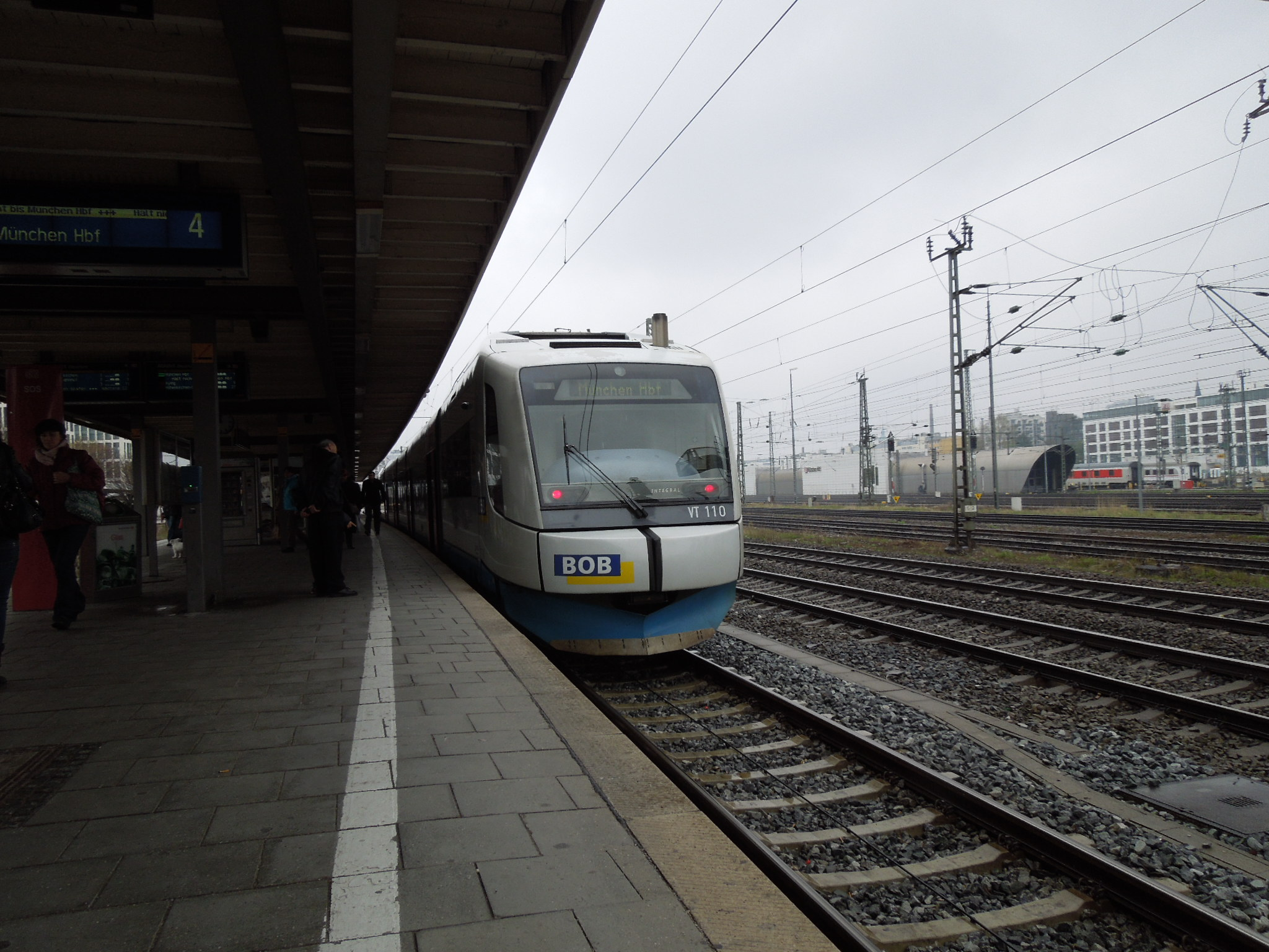 Bob dízel motorvonat Donnersbergerbrücke állomáson